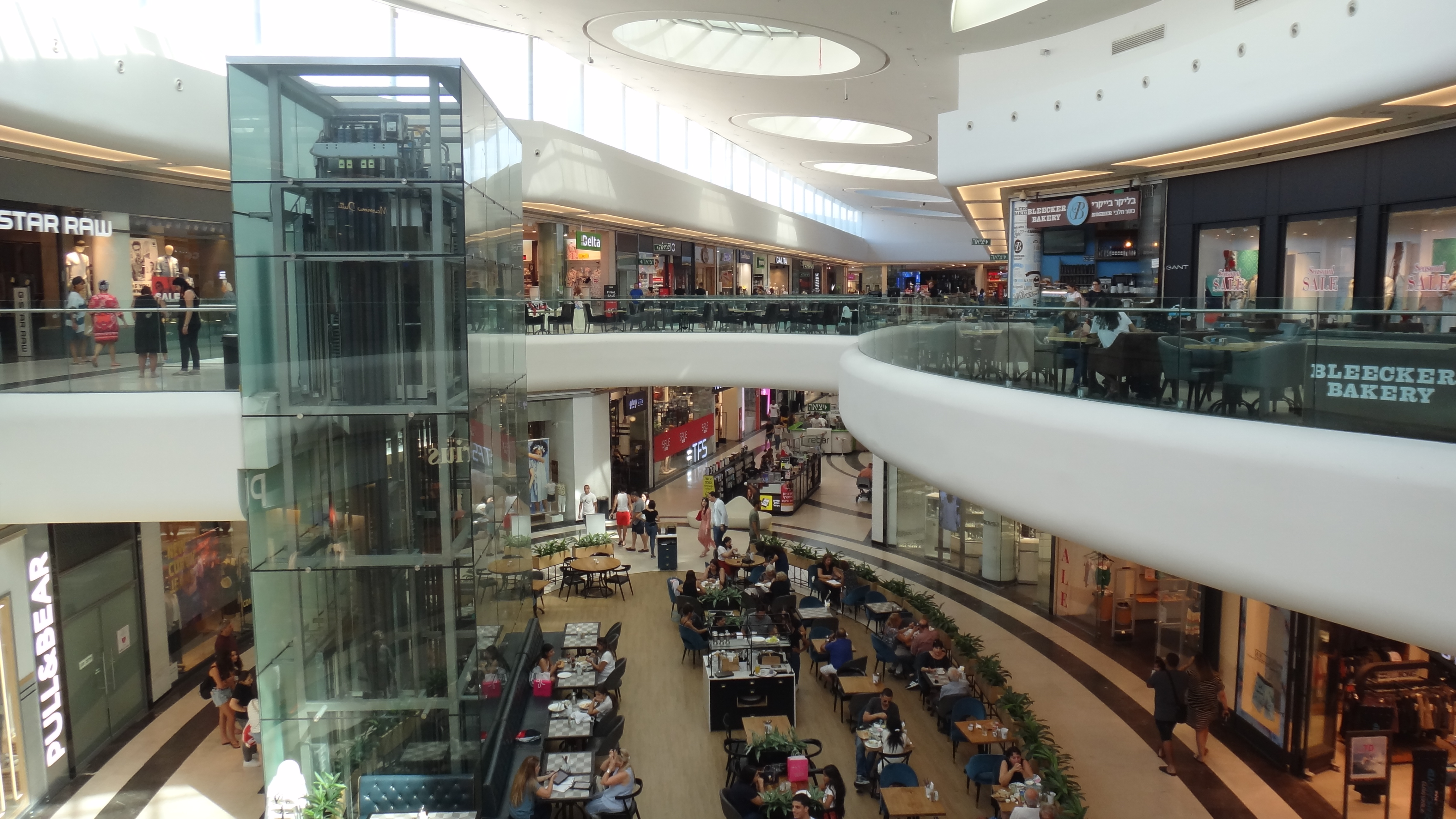 מראה בתוך הקניון